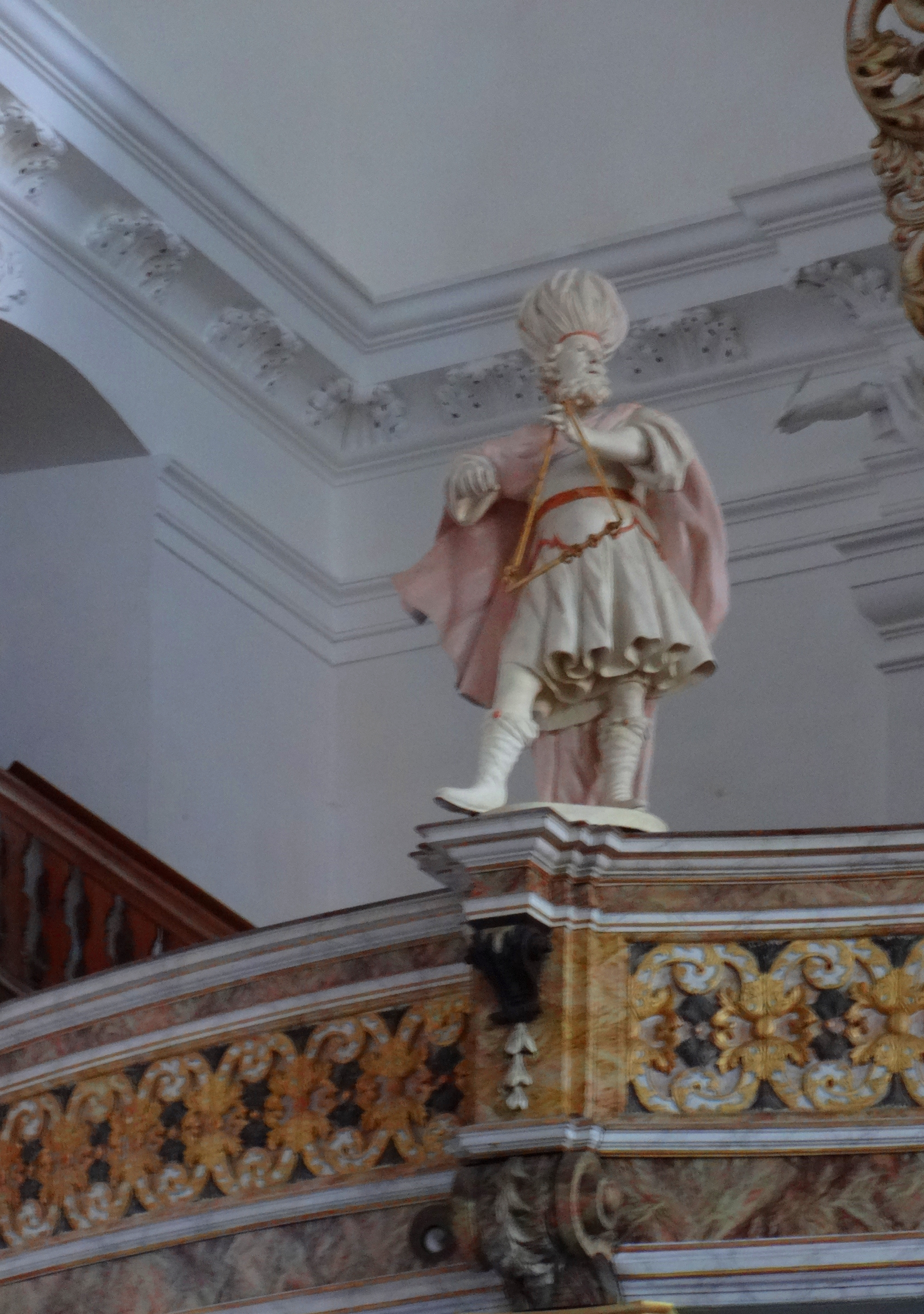 Goslar-Grauhof, St. Georg, Orgelempore links, Asaf mit Triangel